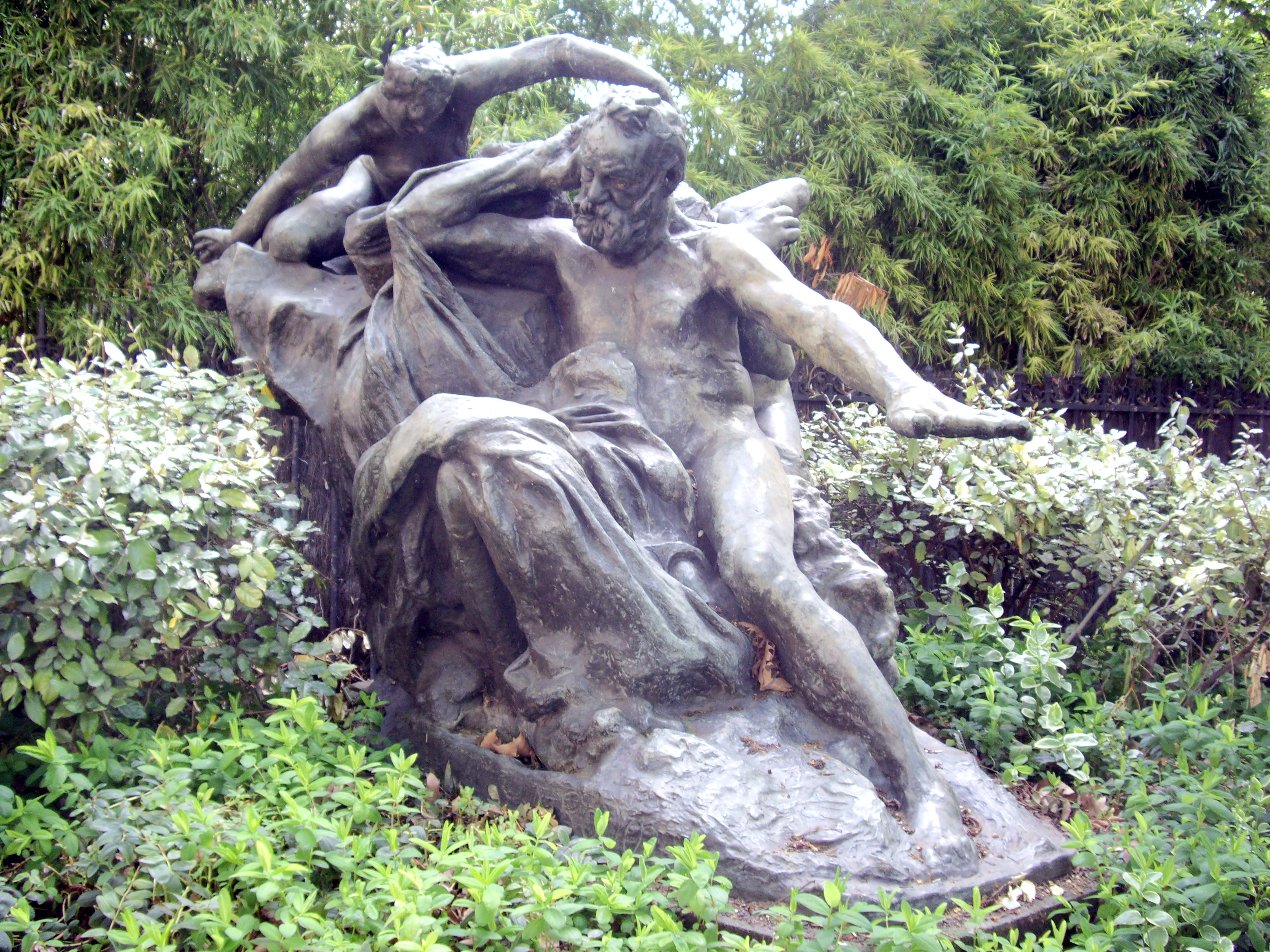 Victor Hugo et les Muses (1909), angle de l'avenue Victor-Hugo et de l'avenue Henri-Martin, Paris 16e. Statue en bronze par Auguste Rodin (1840-1917). Une autre version de la même statue se trouve dans le jardin du musée Rodin.